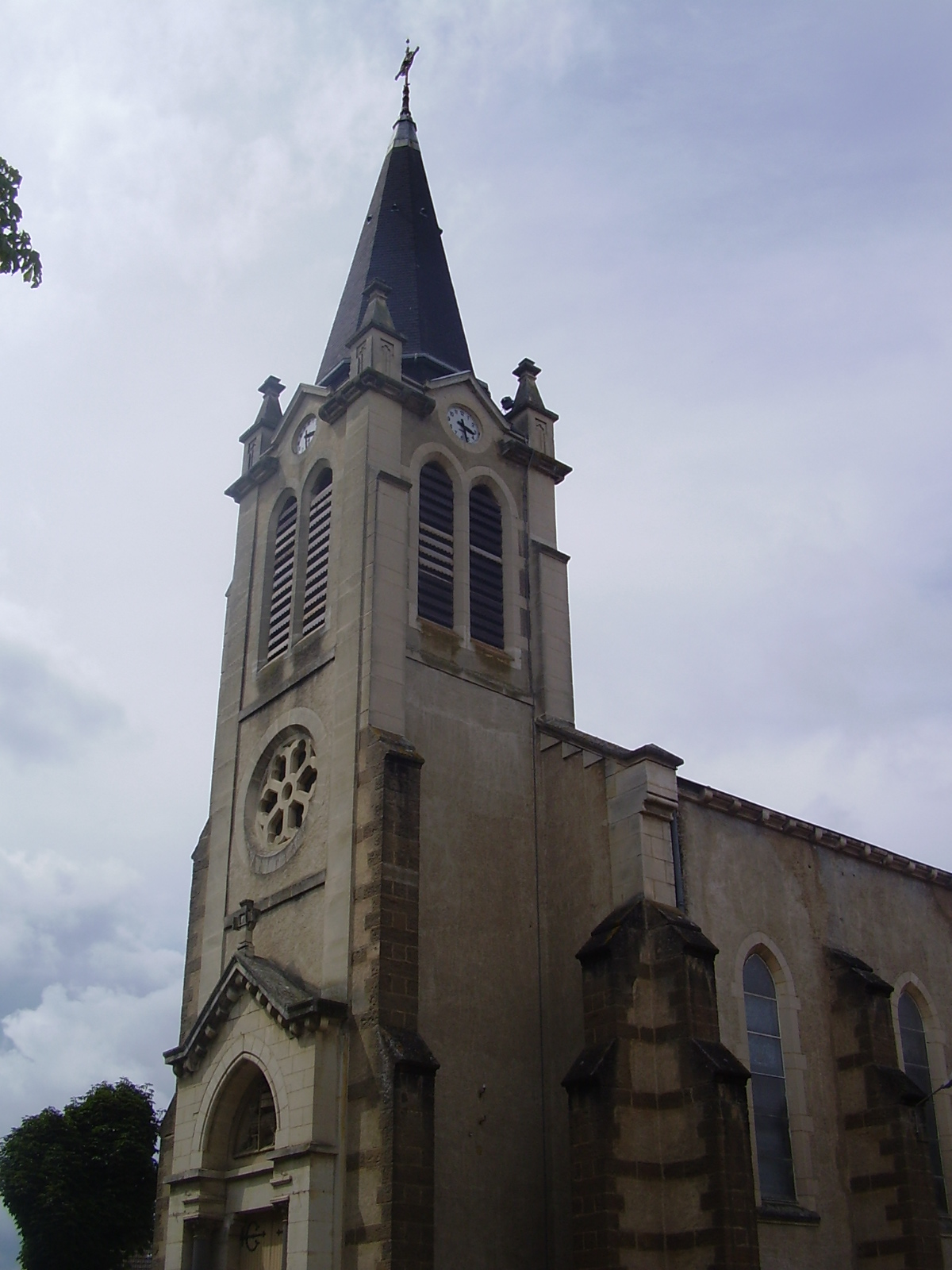 Église de Bellerive-sur-Allier, Allier, Auvergne, France